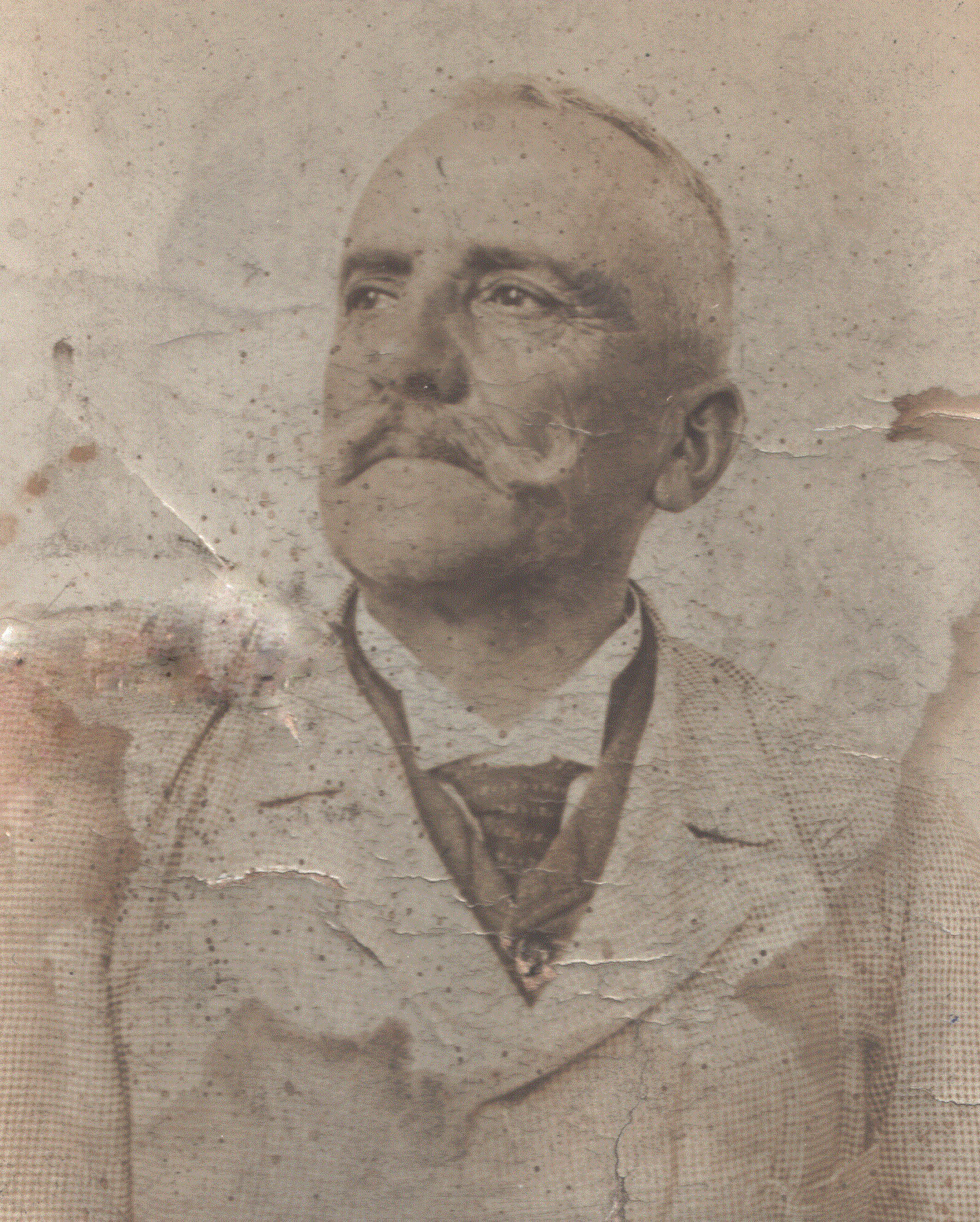 Stanisław Żurowski zarządca majątku Fredrów i Skarbków